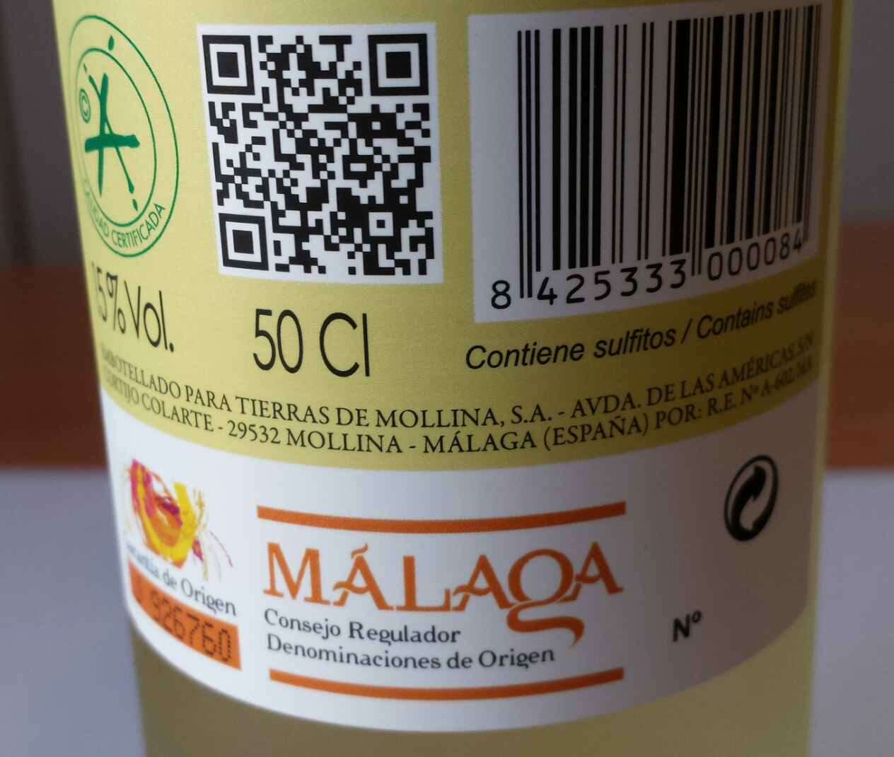 Etiqueta de vino de la DO Málaga, España